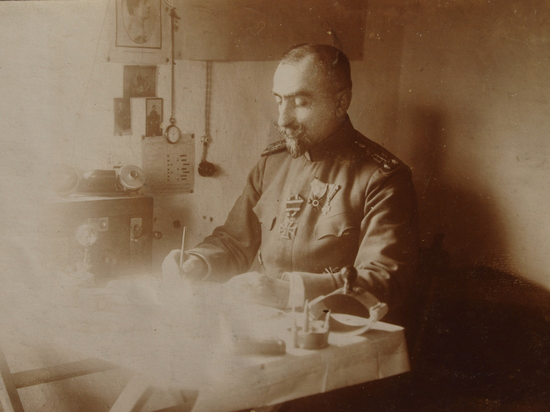 Полковник Петър Дървингов като началник-щаб на Моравската военноинспекционна област, 14 януари 1918 г.